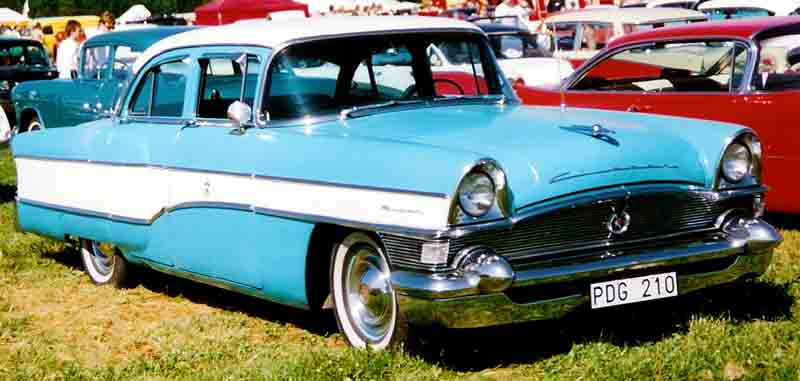 Packard Clipper Super Touring Sedan model 5642 (1956)